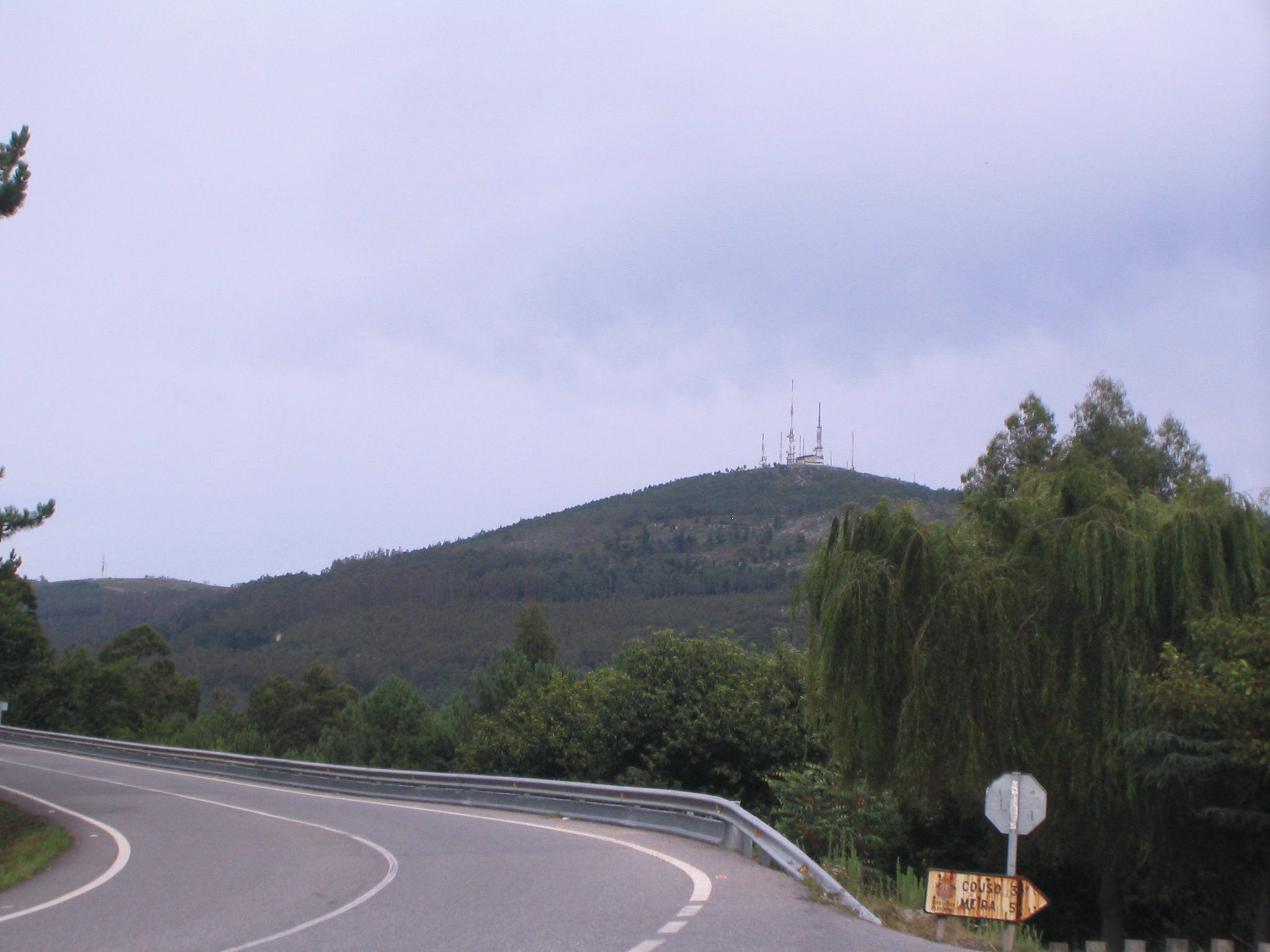 Vista del monte Faro de Domaio desde el mirador de As Fragas, en Moaña, Galicia (España).